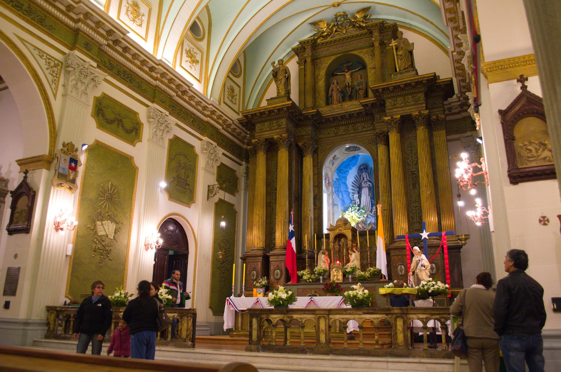 Altyar mayor, Basílica Corazón de María This is a photo of a national monument in Chile: 869